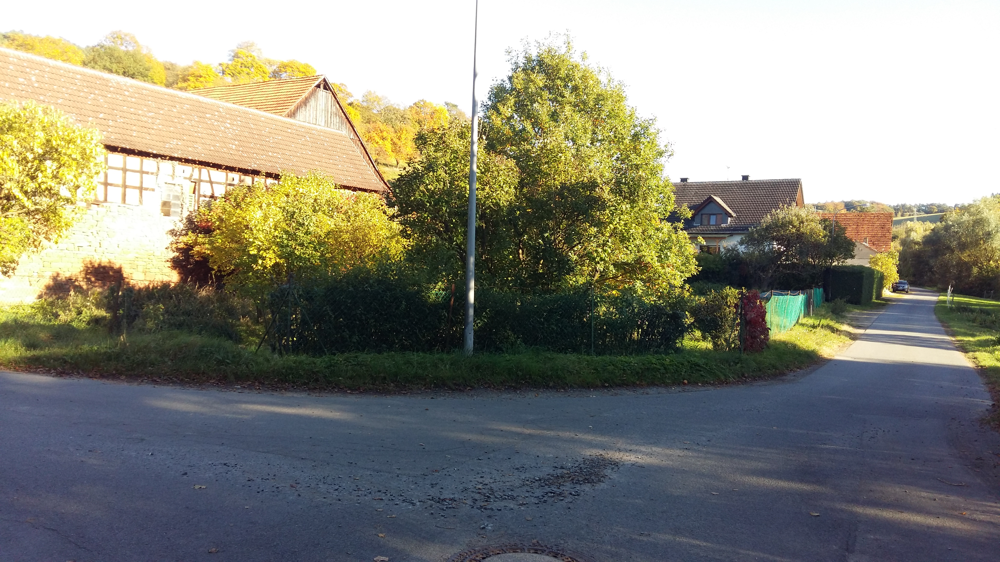 Ortsmitte des Groß-Umstädter Stadtteils Frau-Nauses